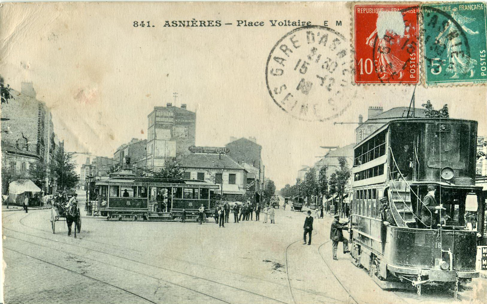 Carte ancienne éditée par EM N° 841 Asnières-sur-Seine : Place Voltaire